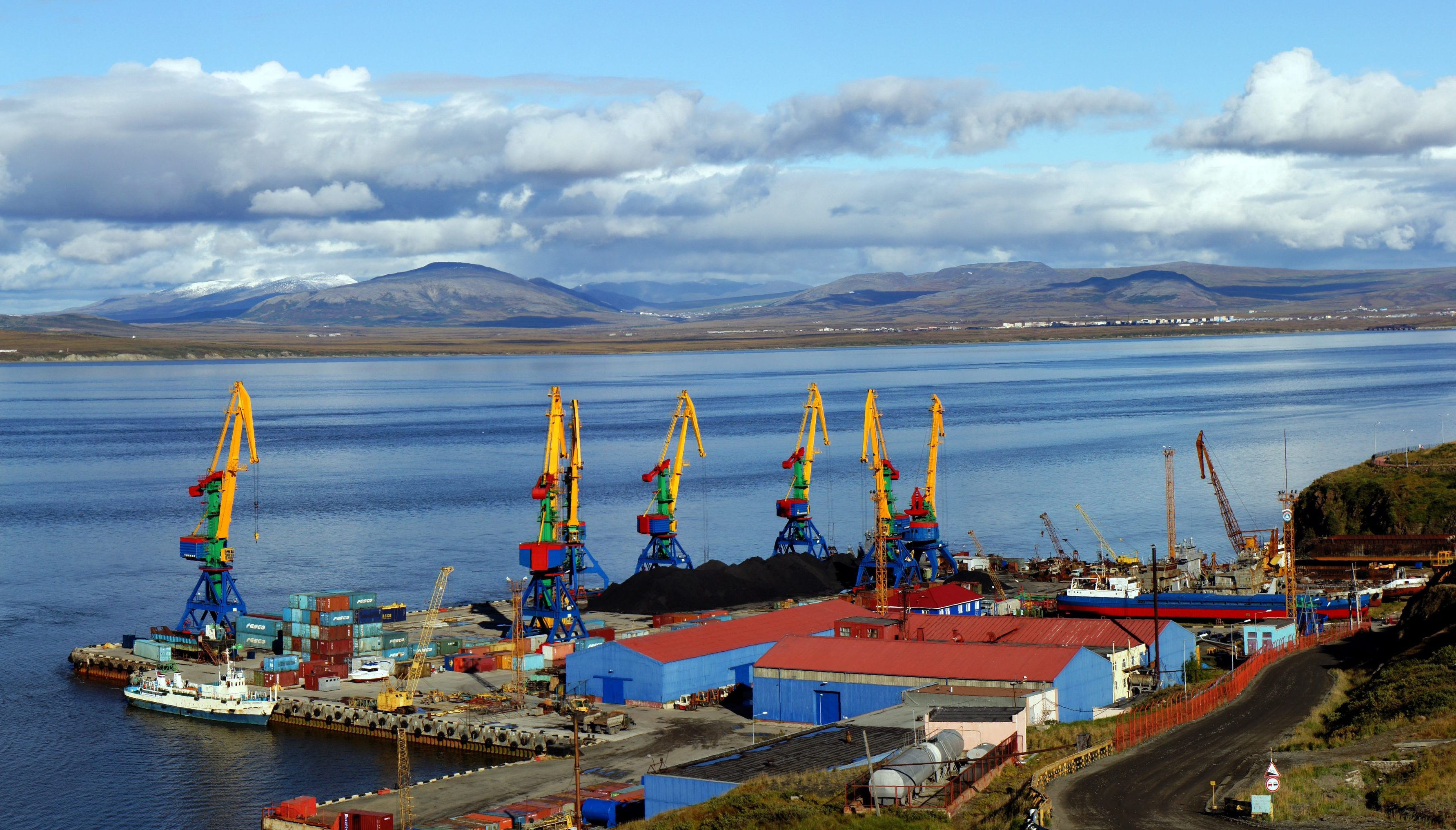 Анадырский морпорт